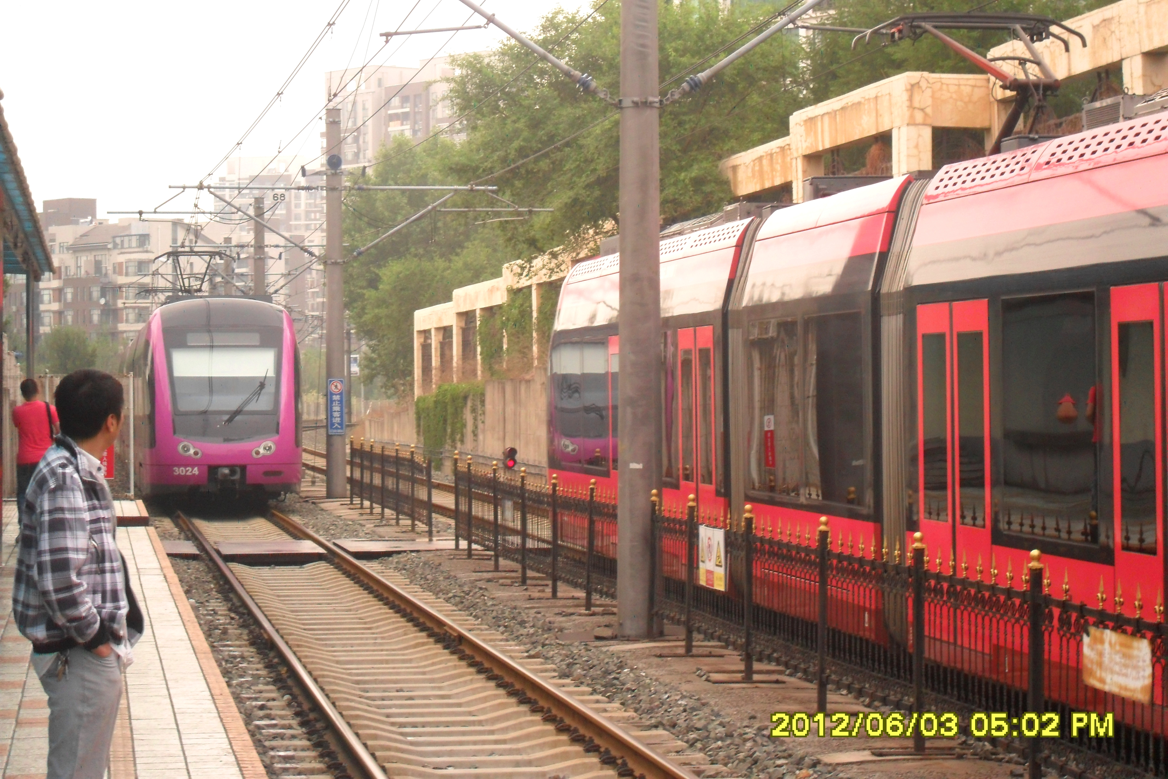 中文（中国大陆）: 长春轻轨3号线